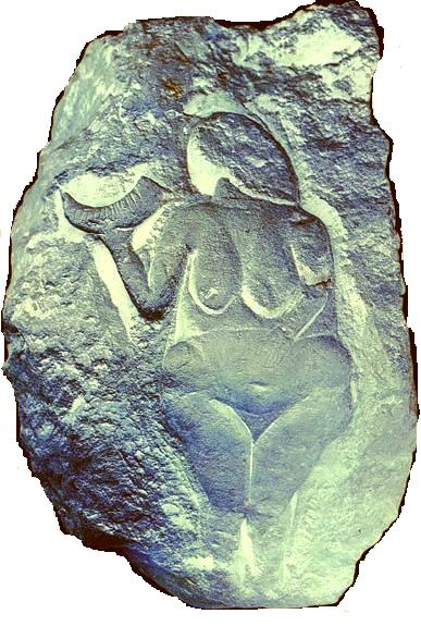 Eigen foto bewerking